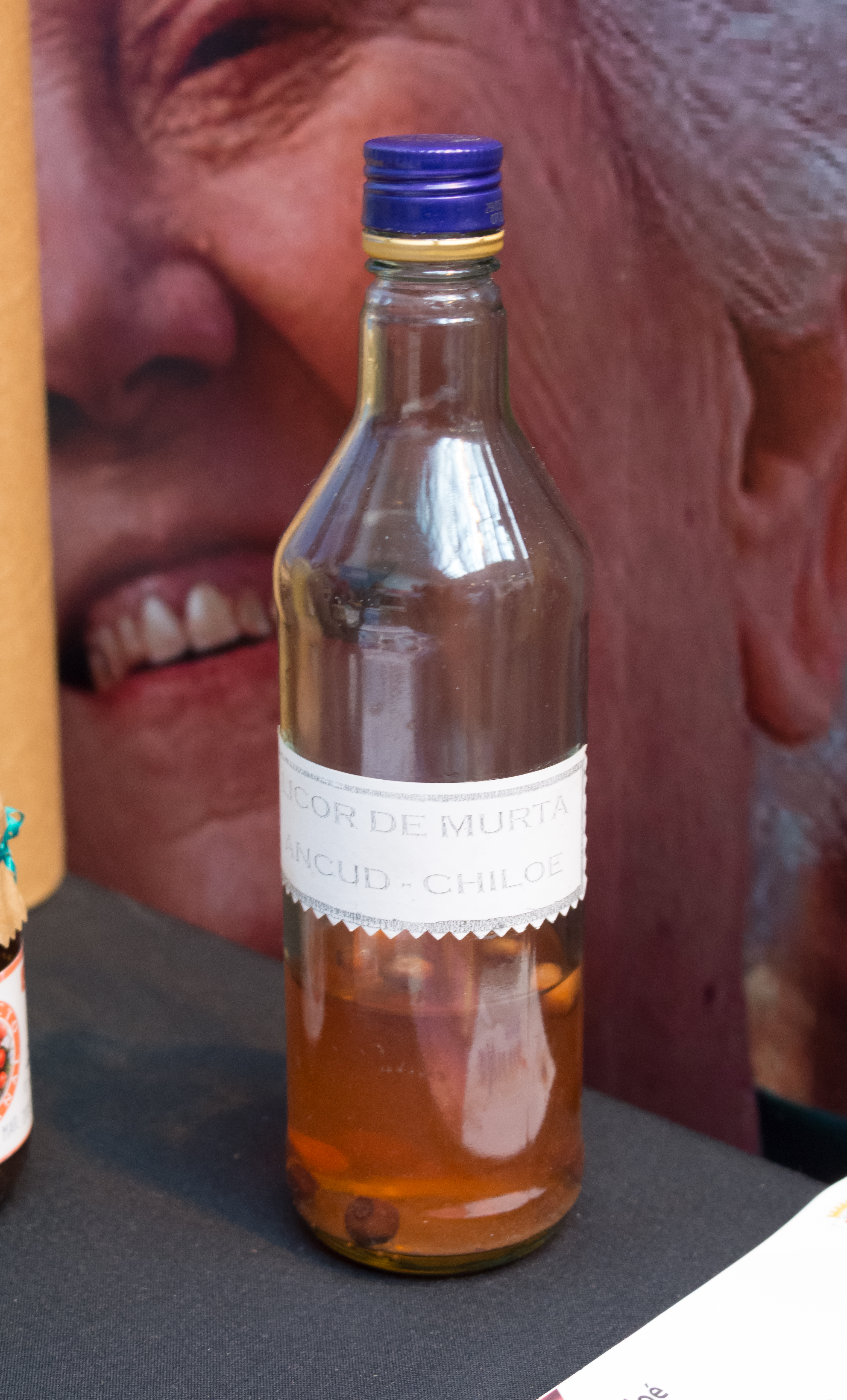 Feria vacaciones tercera edad Sernatur 2019, Providencia, Santiago, Chile.